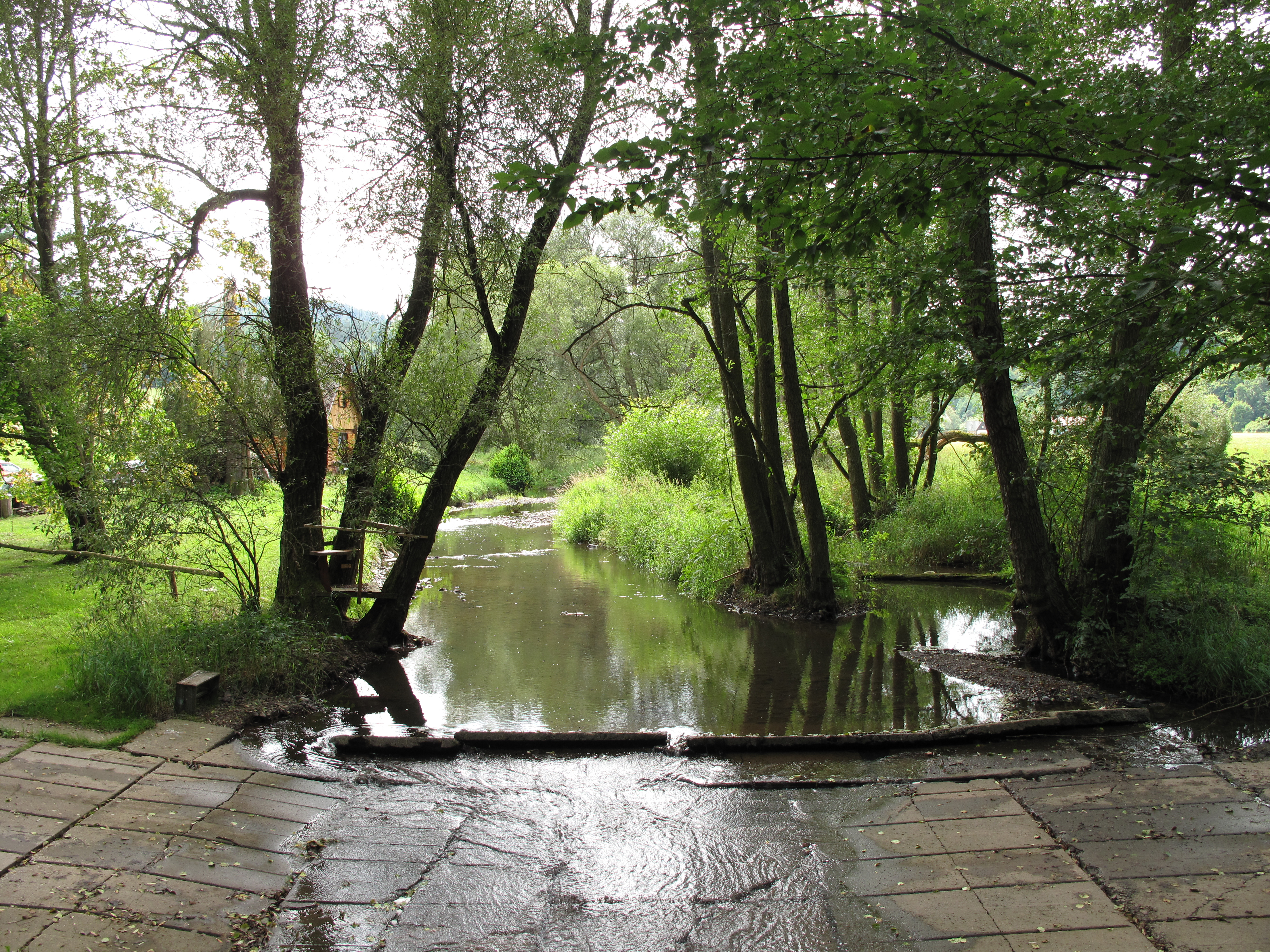 Brod Zbirožského potoka v CHKO Křivoklátsko. Okres Rokycany, Česká republika.